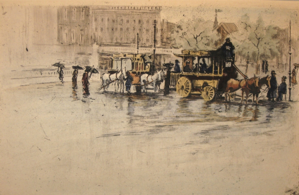 Kurt Dietrich Losch (1889–1944), Maler Graphiker: Am Halleschen Tor; Kolorierte Radierung um 1912, Das Bild befindet sich im Losch-Archiv bei Joachim Artz, 12203 Berlin, Hindenburgdamm 93 B, Hs.2, Tel. 030-8342049